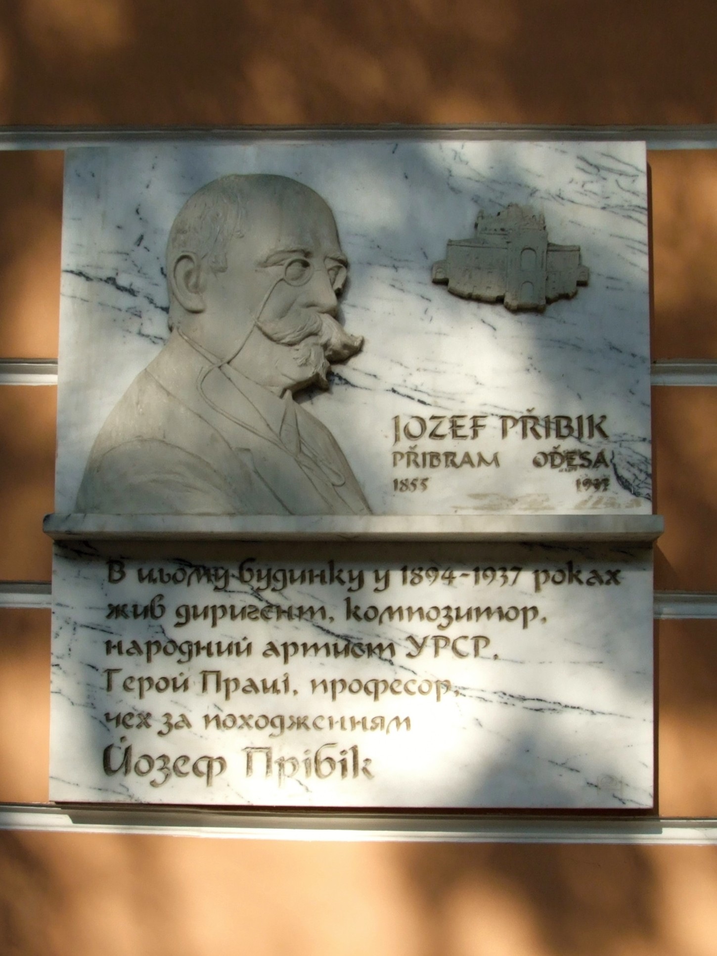 Будинок, арх. Д.Я. Климов, 1888 р. В якому жив композитор, педагог і головний диригент Одеського театру опери та балету И. Прибик.